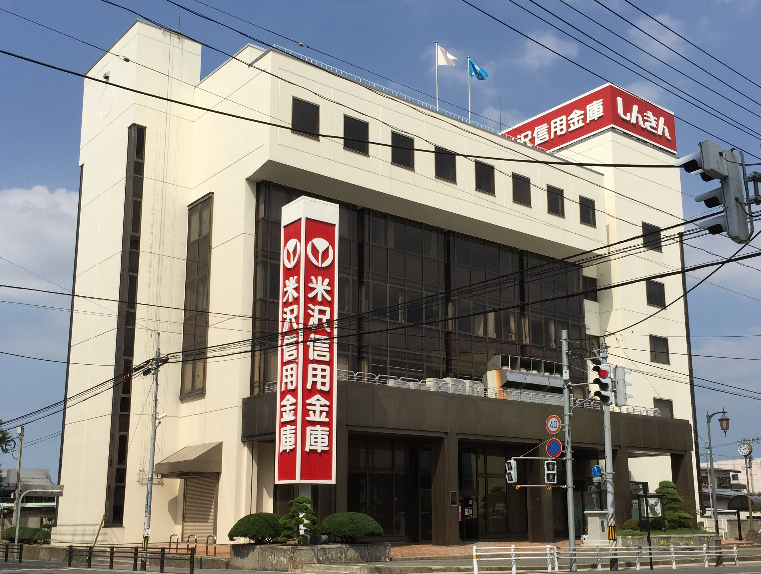 米沢信用金庫本店